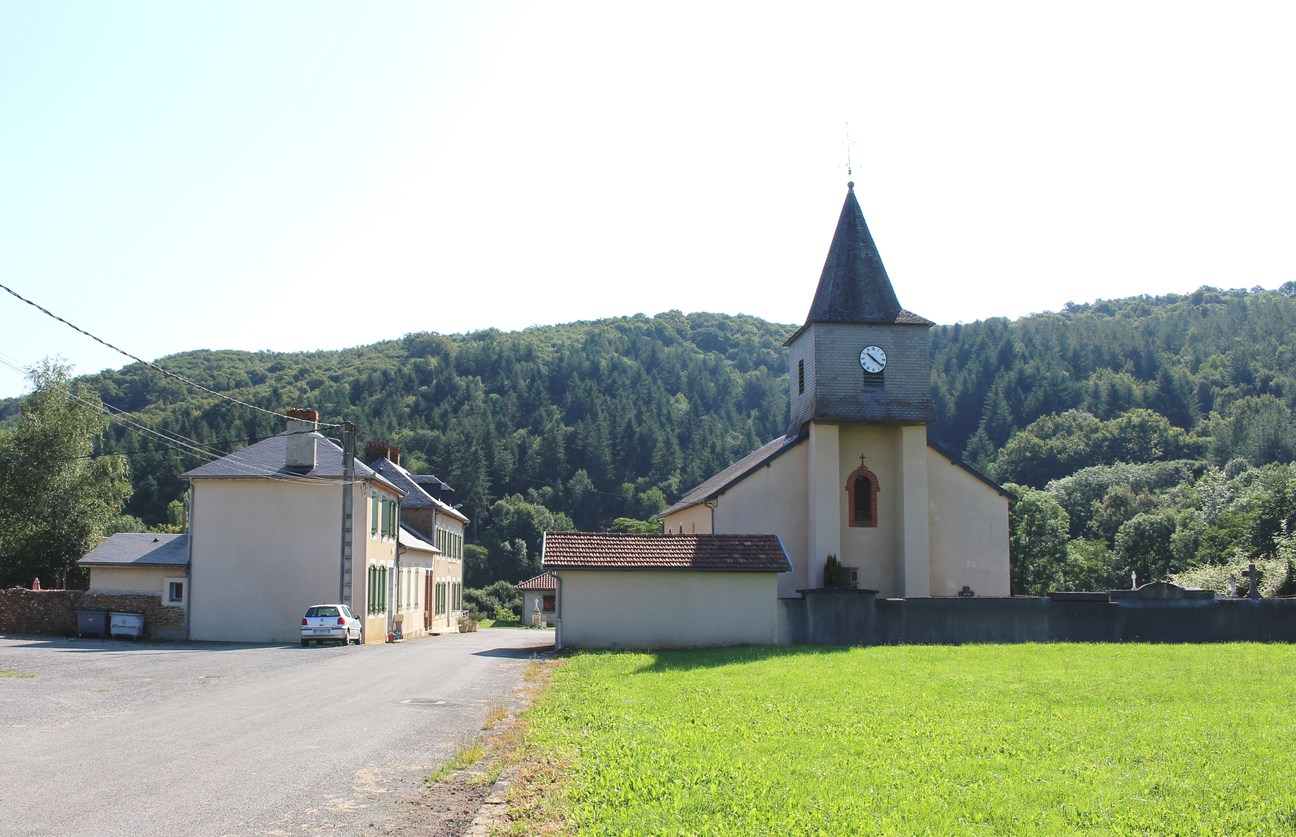 Galez (Hautes-Pyrénées)